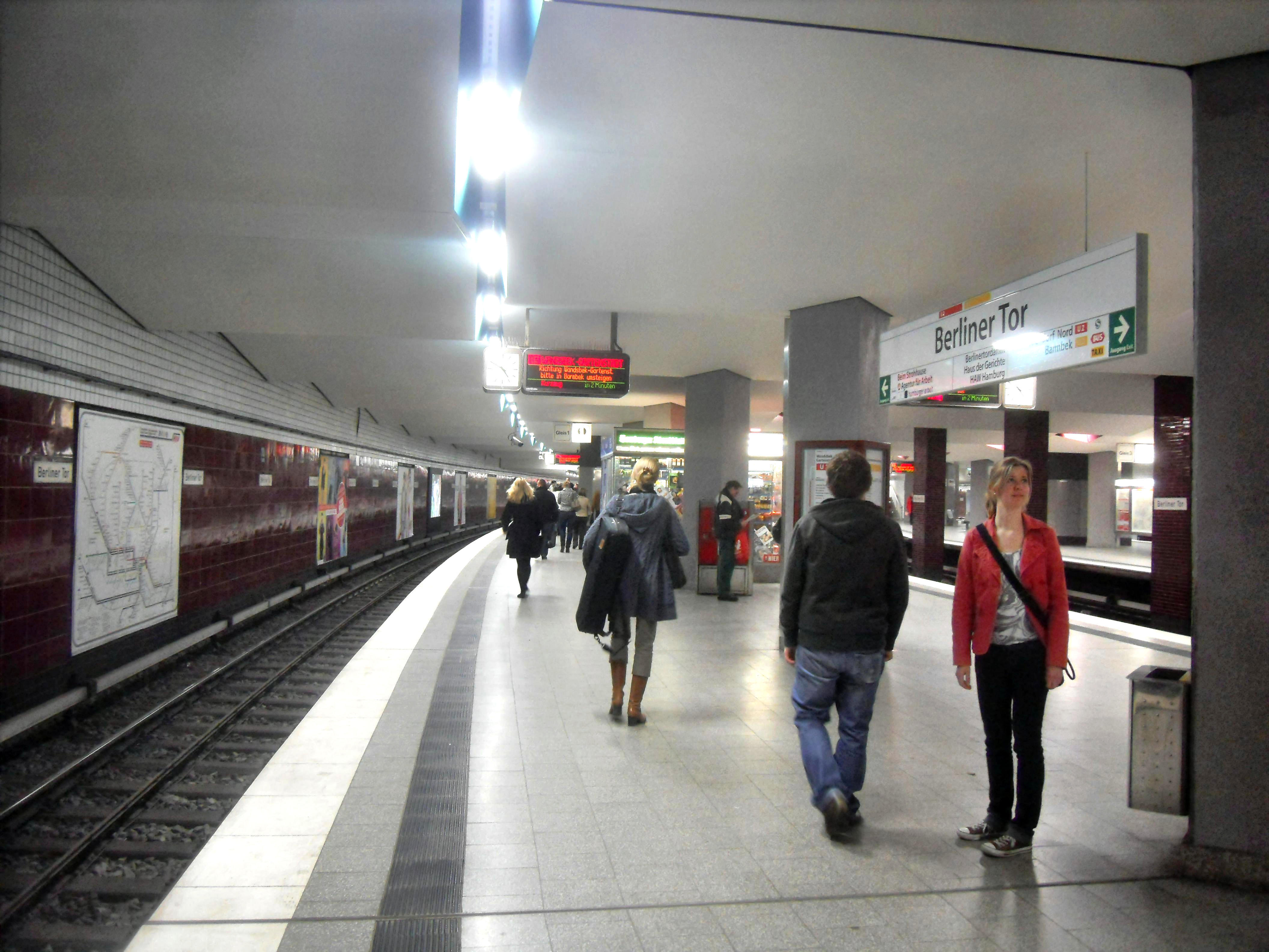 Der Hamburger U-Bahnhof Berliner Tor in Deutschland